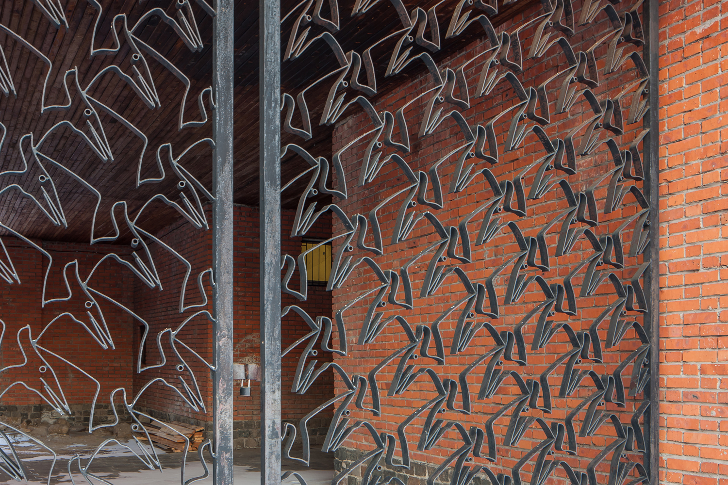 Палеонтологический музей имени Ю. А. Орлова